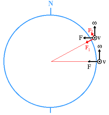 השפעת כוח קויריוליס על גופים שנעים מערבה, בקווי רוחב שונים.